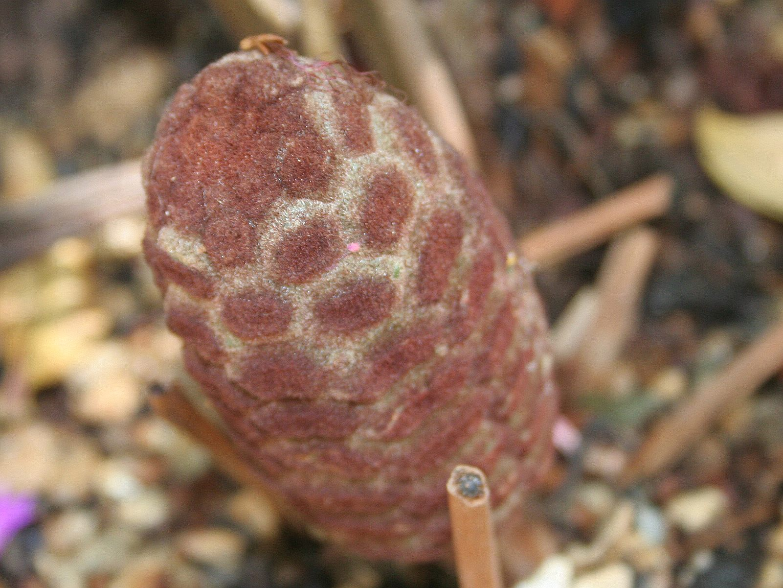 Zamia integrifolia Conservatoire botanique national de Brest, France, juin 2007